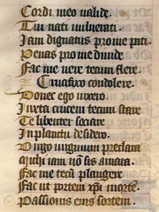 Extrait de la séquence "Stabat mater" dans un manuscrit du XVe siècle.